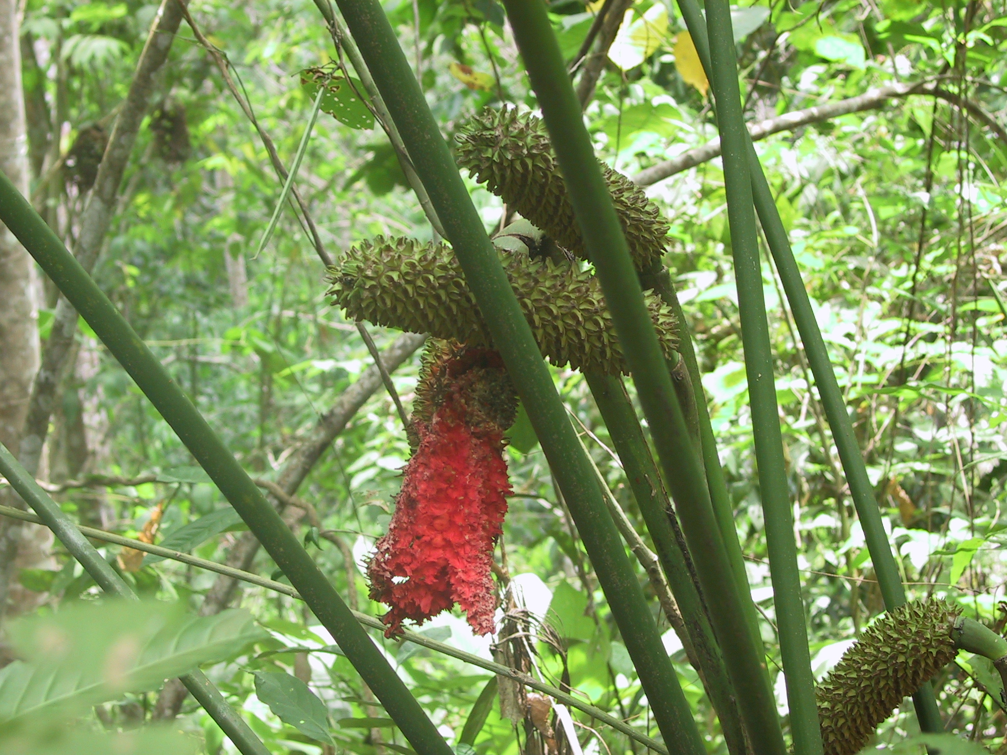 Description: Carludovica drudei, Costa Rica, Reserva Biologica Carara, pacific area Source: self made Date: 2002-17-03 Author = --Ruestz 21:28, 1 April 2006 (UTC) Carludovica drudei -2